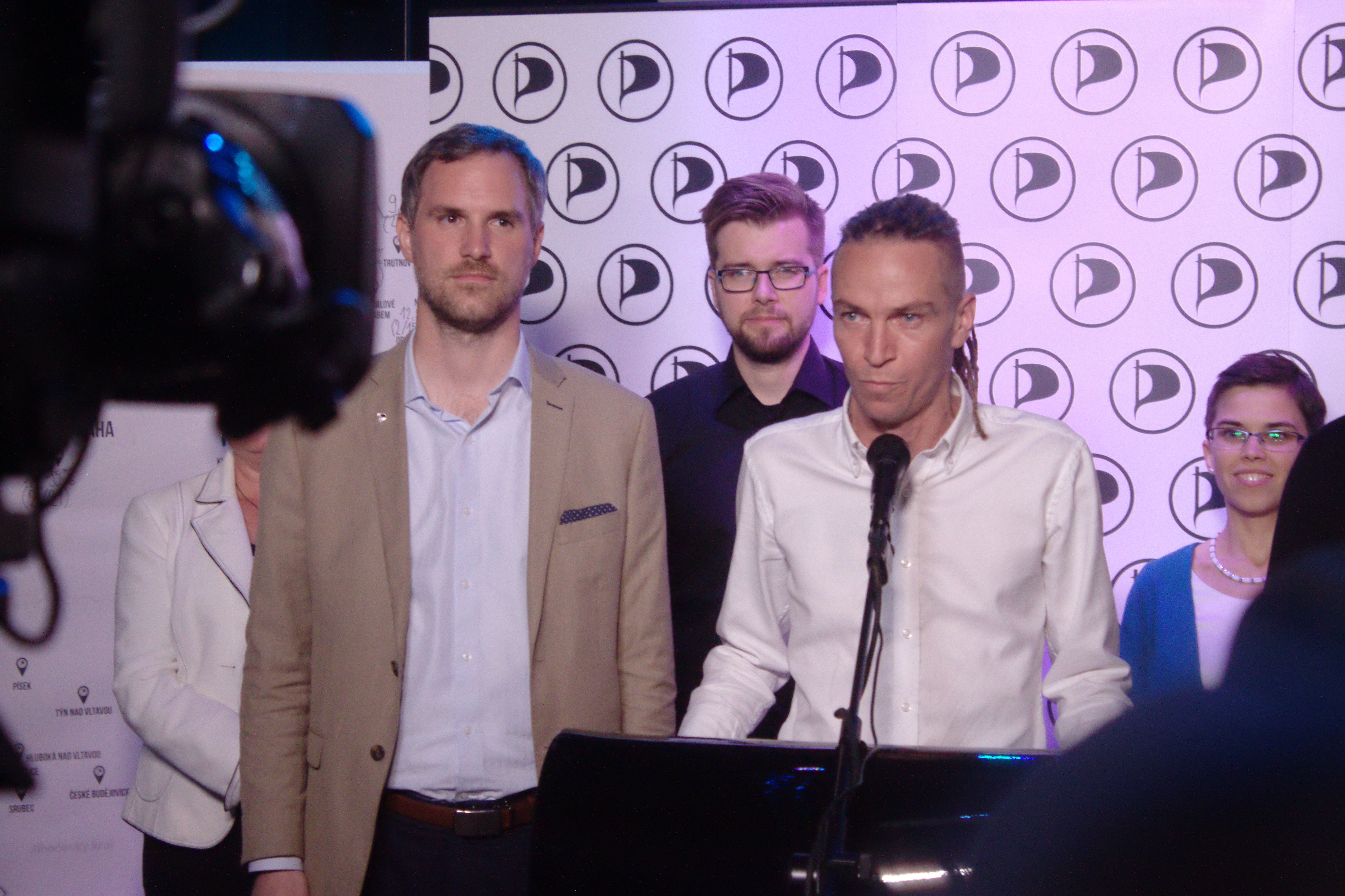 Ivan Bartoš a Zdeněk Hřib během tiskové konference Pirátů k výsledkům voleb v Praze v říjnu 2018